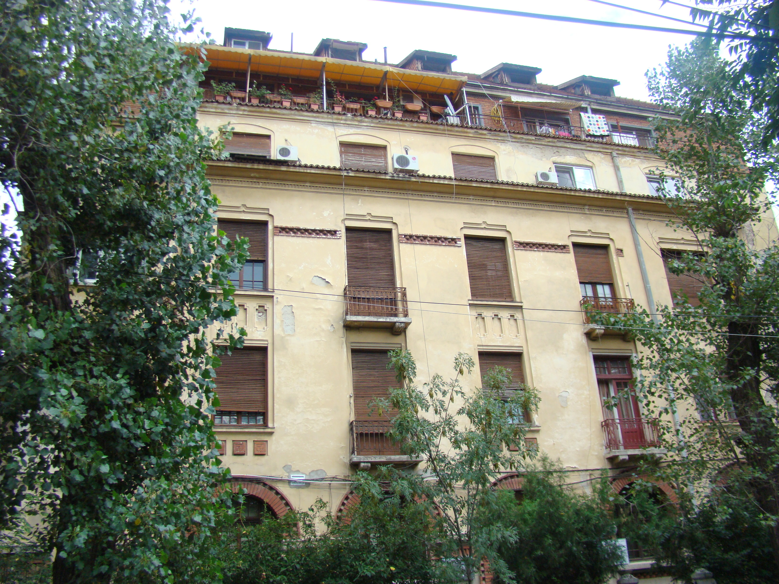 Casă monument istoric, str.Londra, nr.18